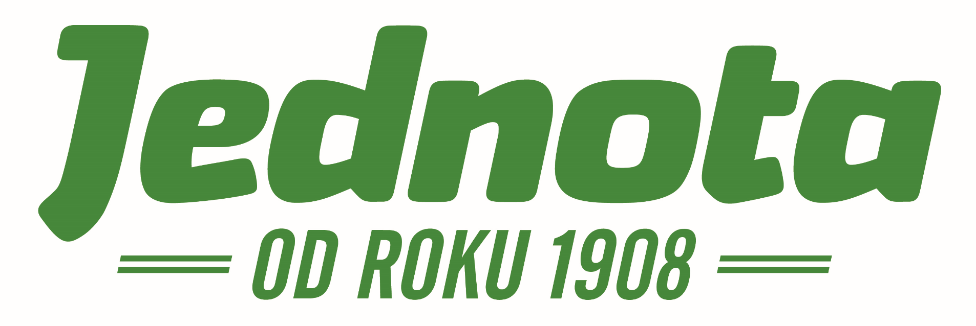 JEDNOTA, spotřební družstvo České Budějovice - logo